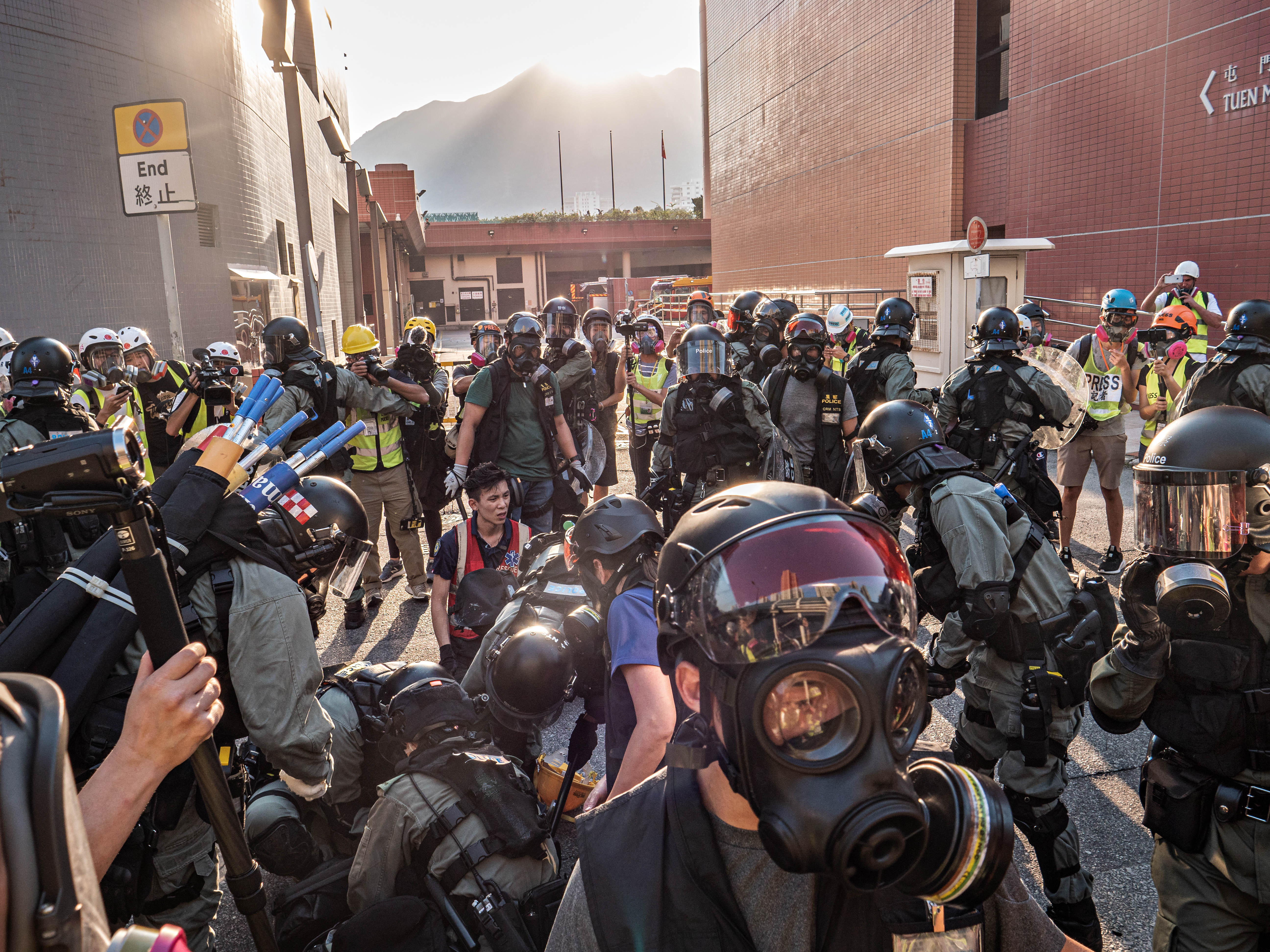 2019-09-22 Tuen Mun 光復屯門公園遊行